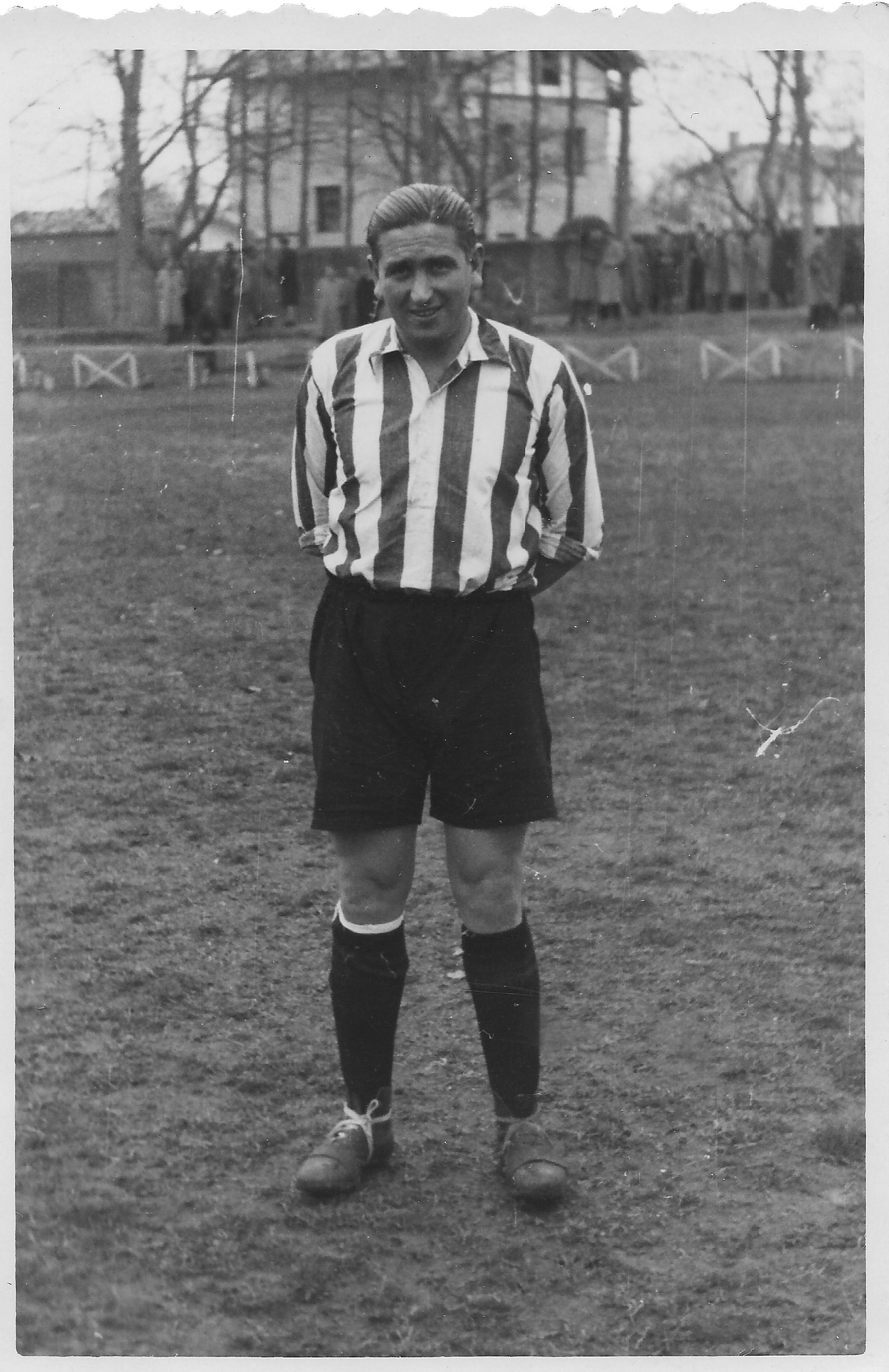 Luisín